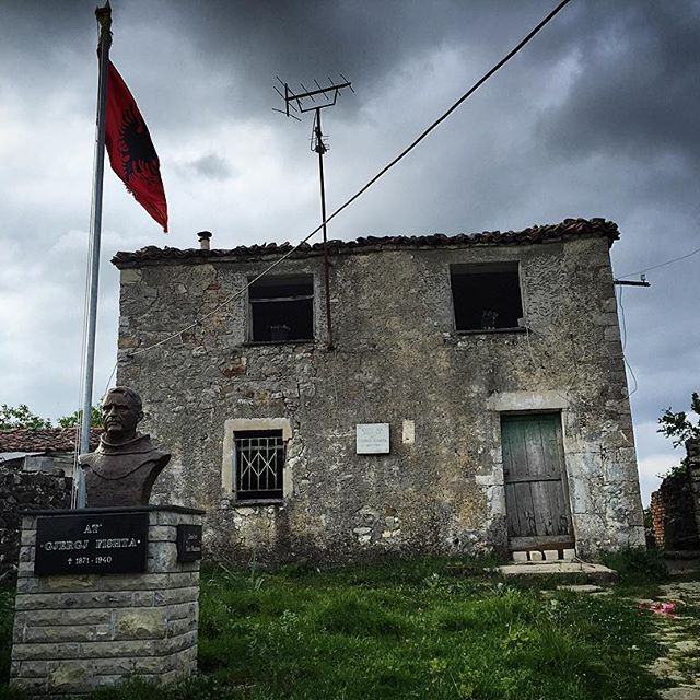 Banesa e Gjergj Fishtës